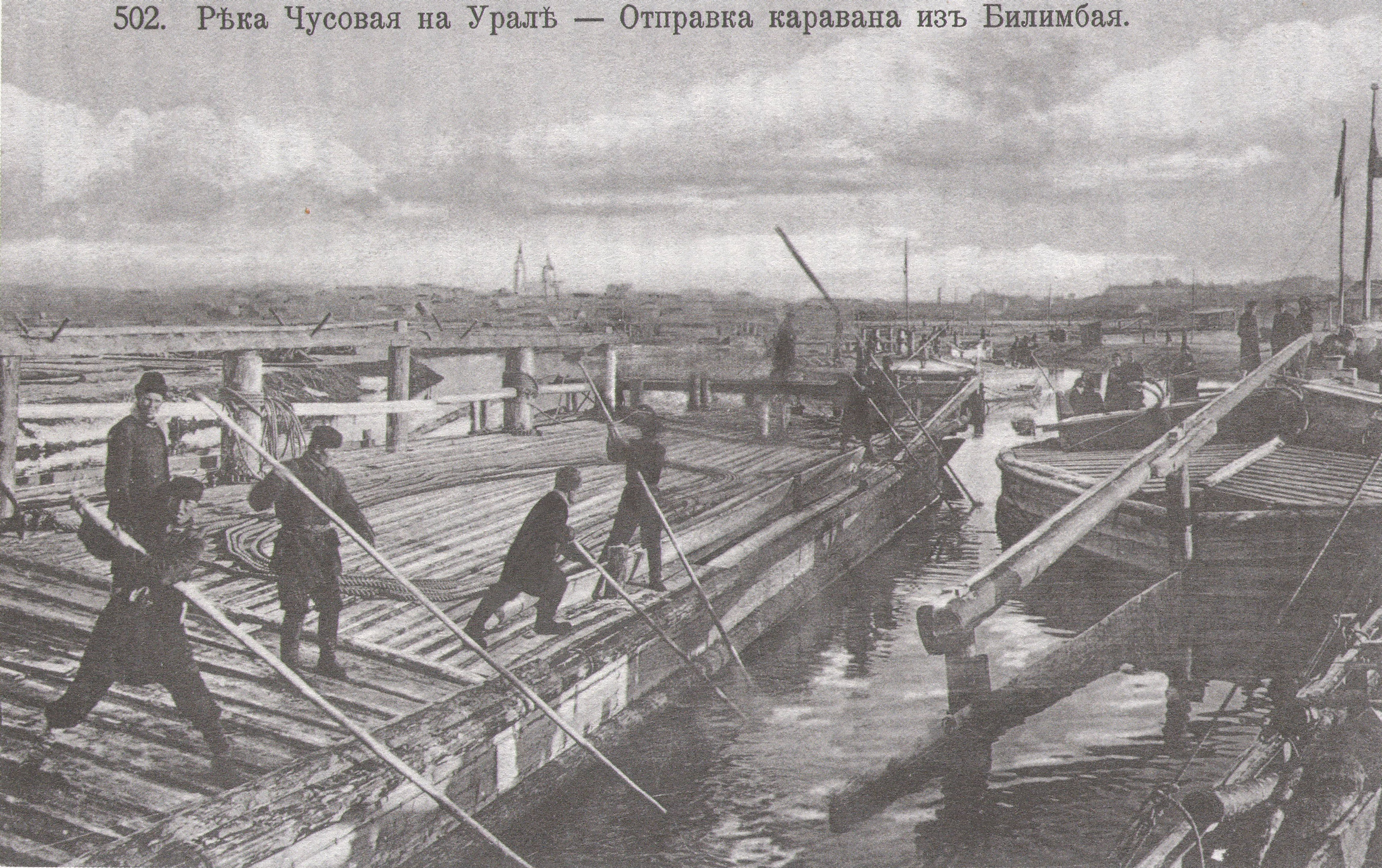 Метенков В.Л. Отправка каравана с Билимбаевской пристани, 1893